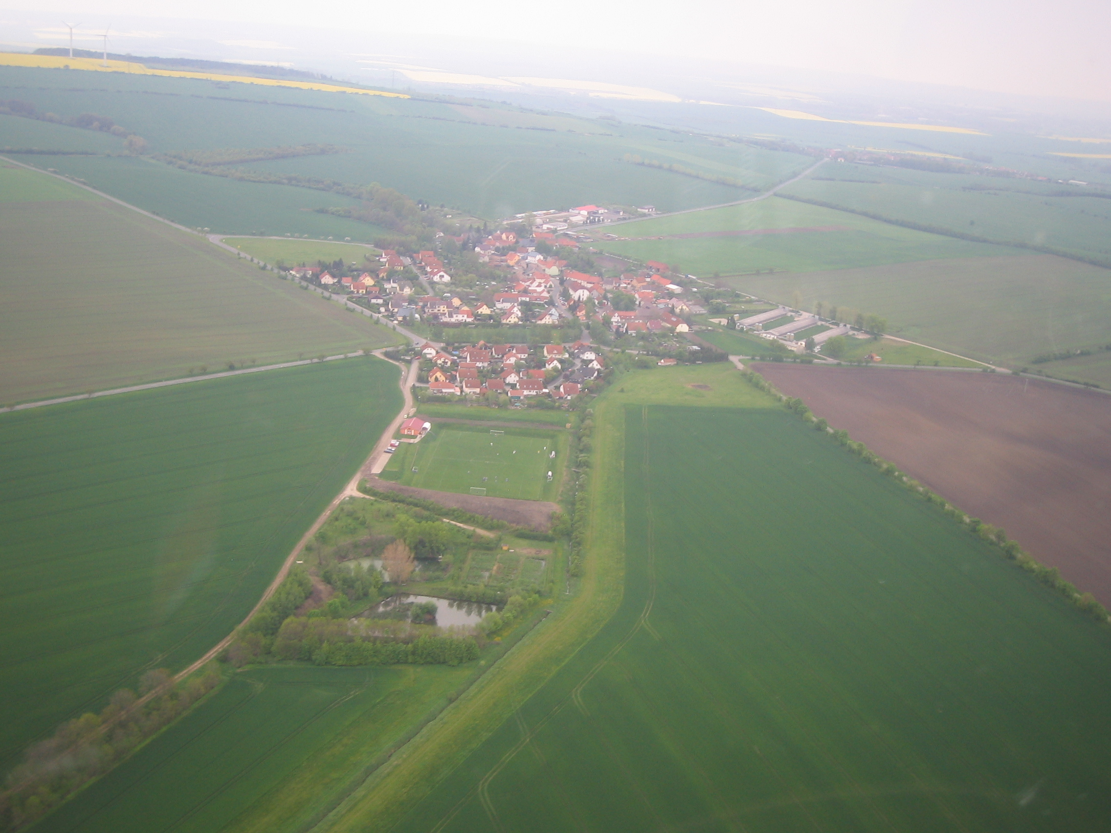 Luftaufnahme von Ballstedt (Mai 2010)